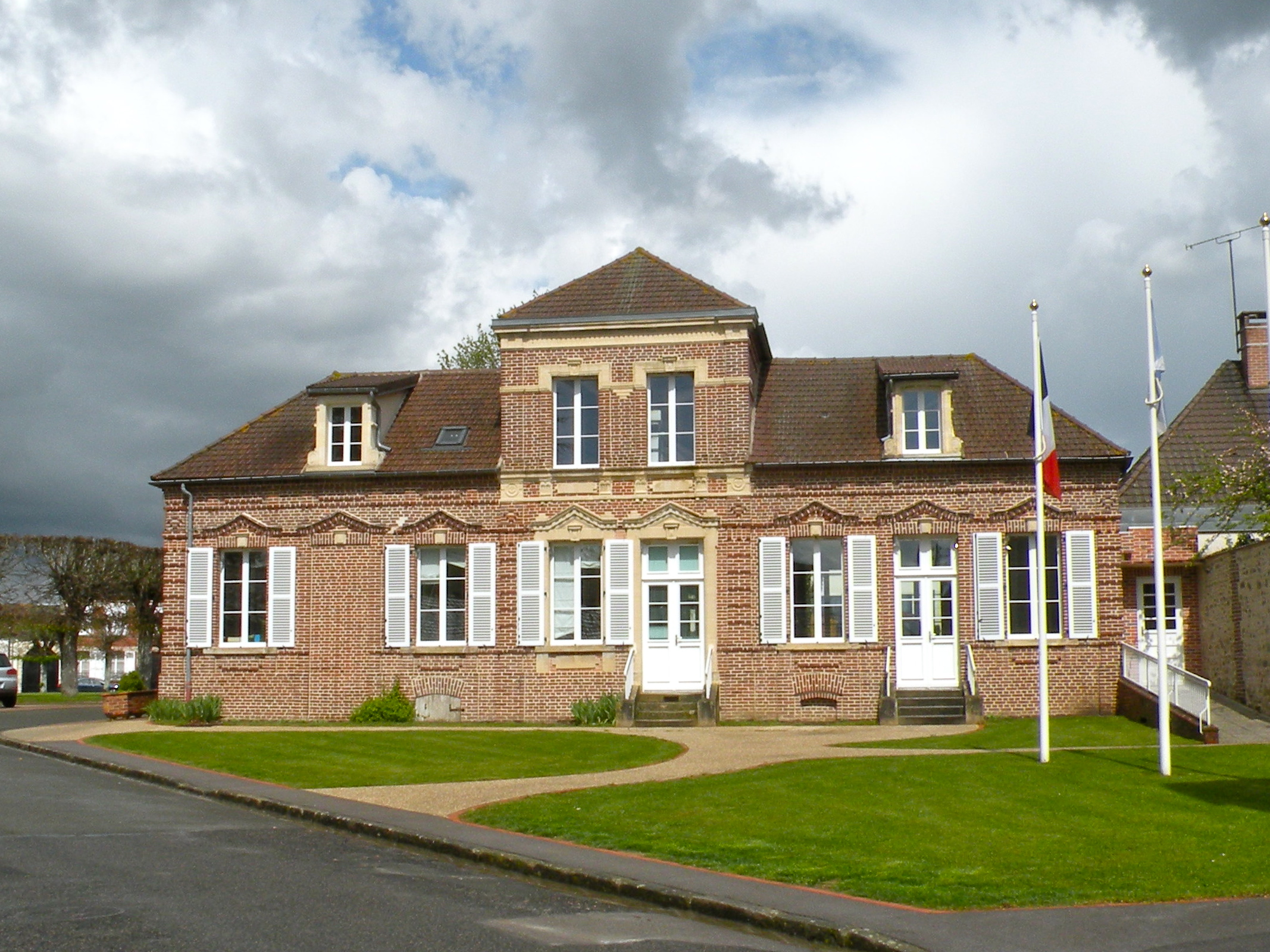 mairie d'Ivry-le-Temple